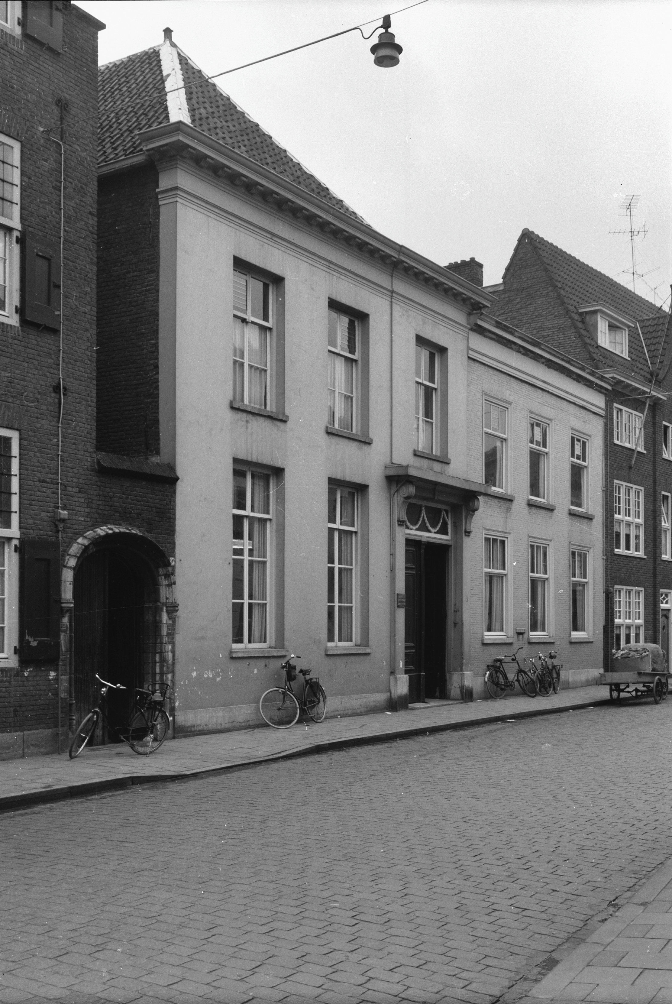 Woonhuizen A: Achter het Wild Varken 9